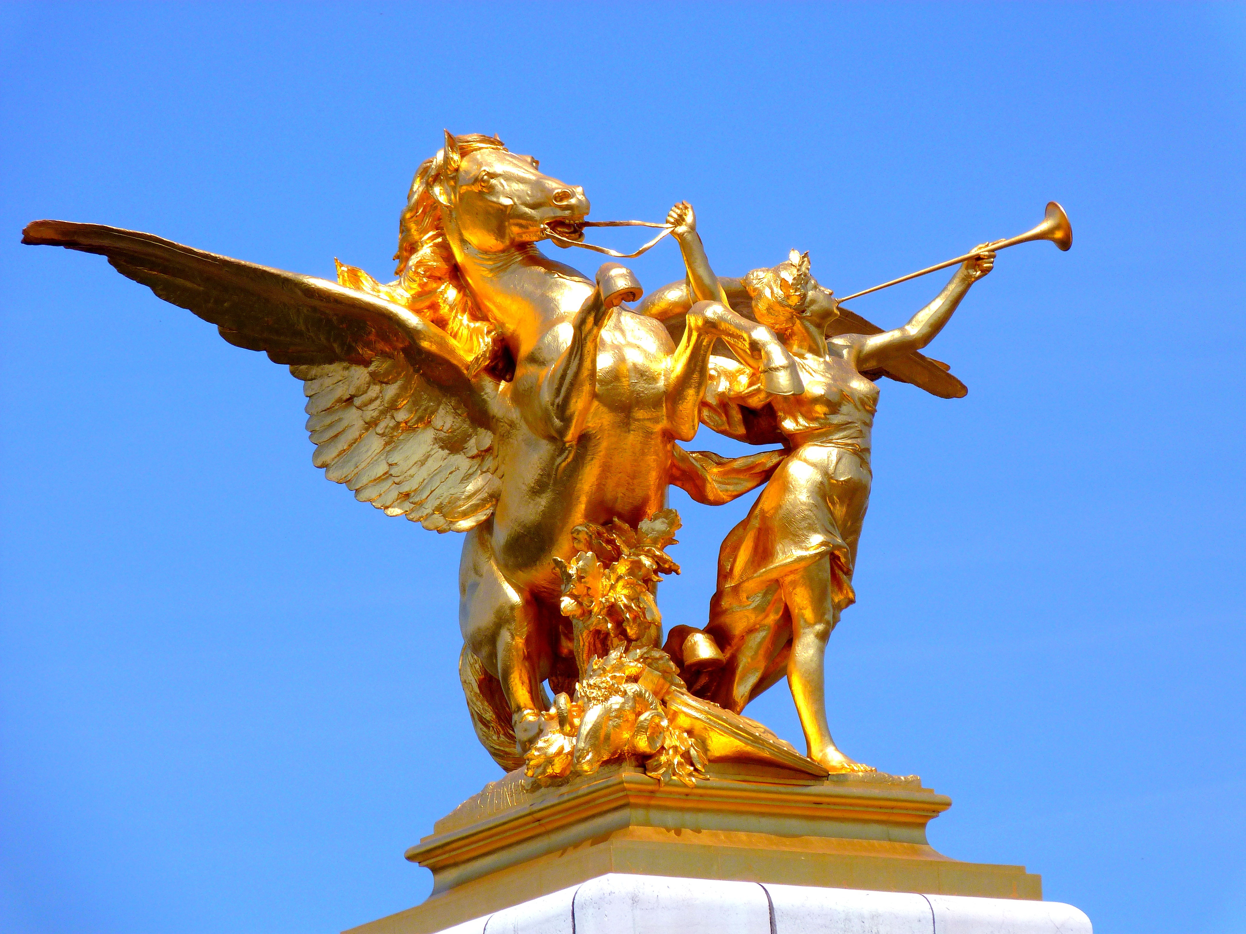 Pegase tenu par la Renommée de la Guerre (1900), groupe en fonte de fer doré, pylône aval gauche à l'entrée du pont Alexandre-III, Paris (7e arrond.) - Sculpteur Léoplod Steiner (1853-1899), signature sur la terrasse (terminé par Eugène Gantzlin).